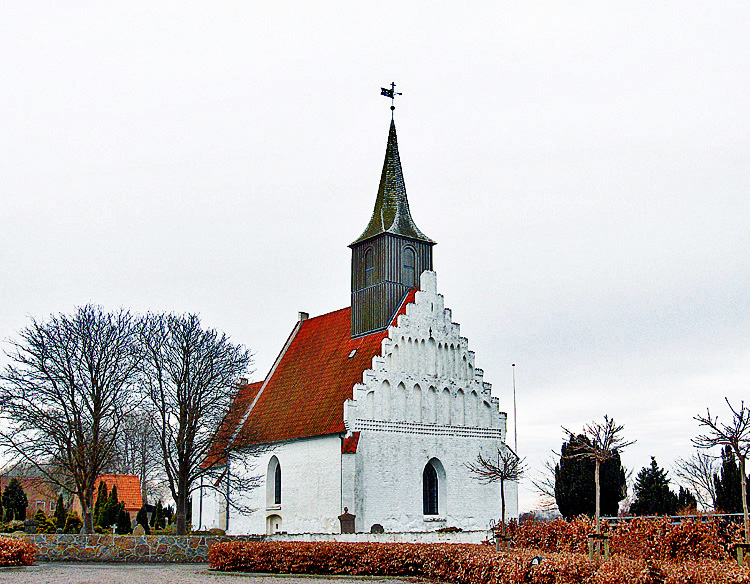 fra nordvest